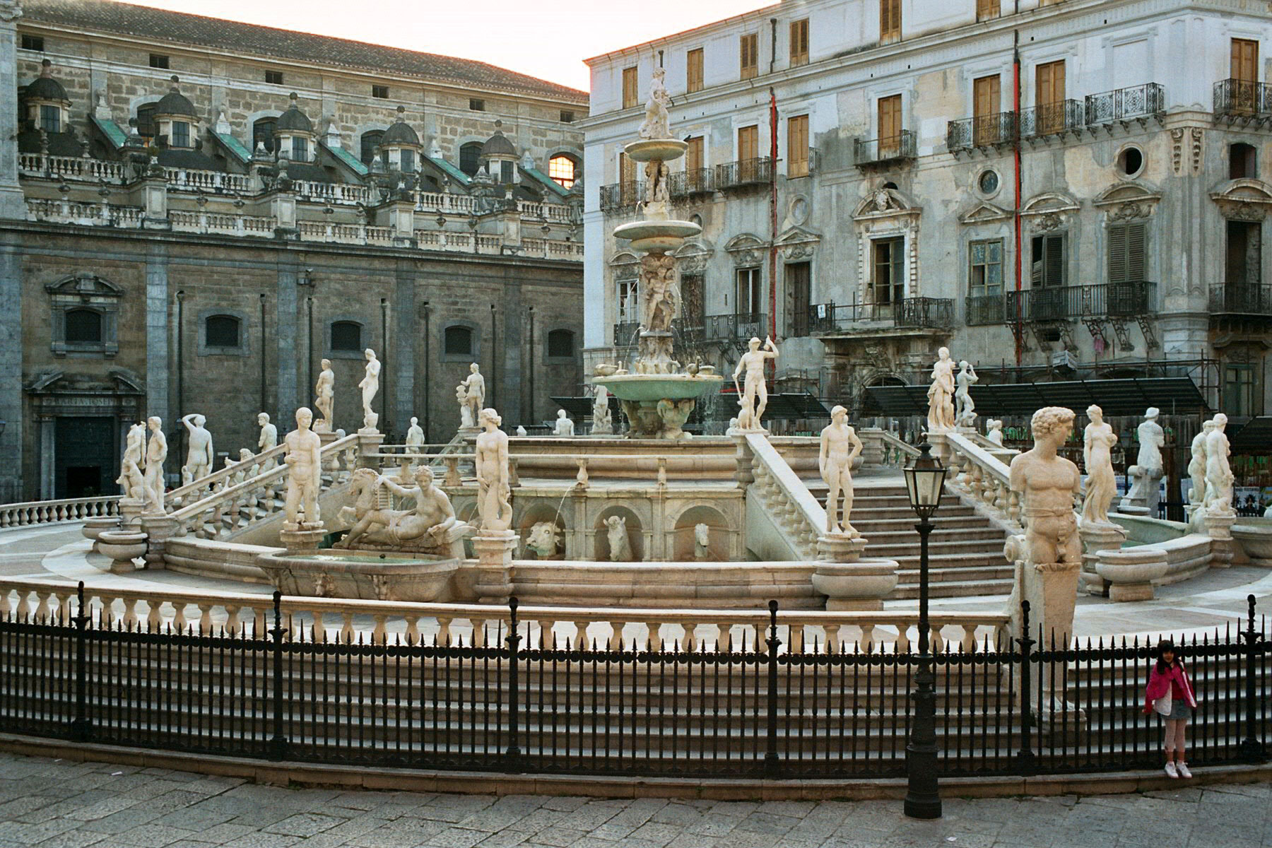 Piazza Pretoria, Palermo Fontana Pretoria seen from Santa Caterina